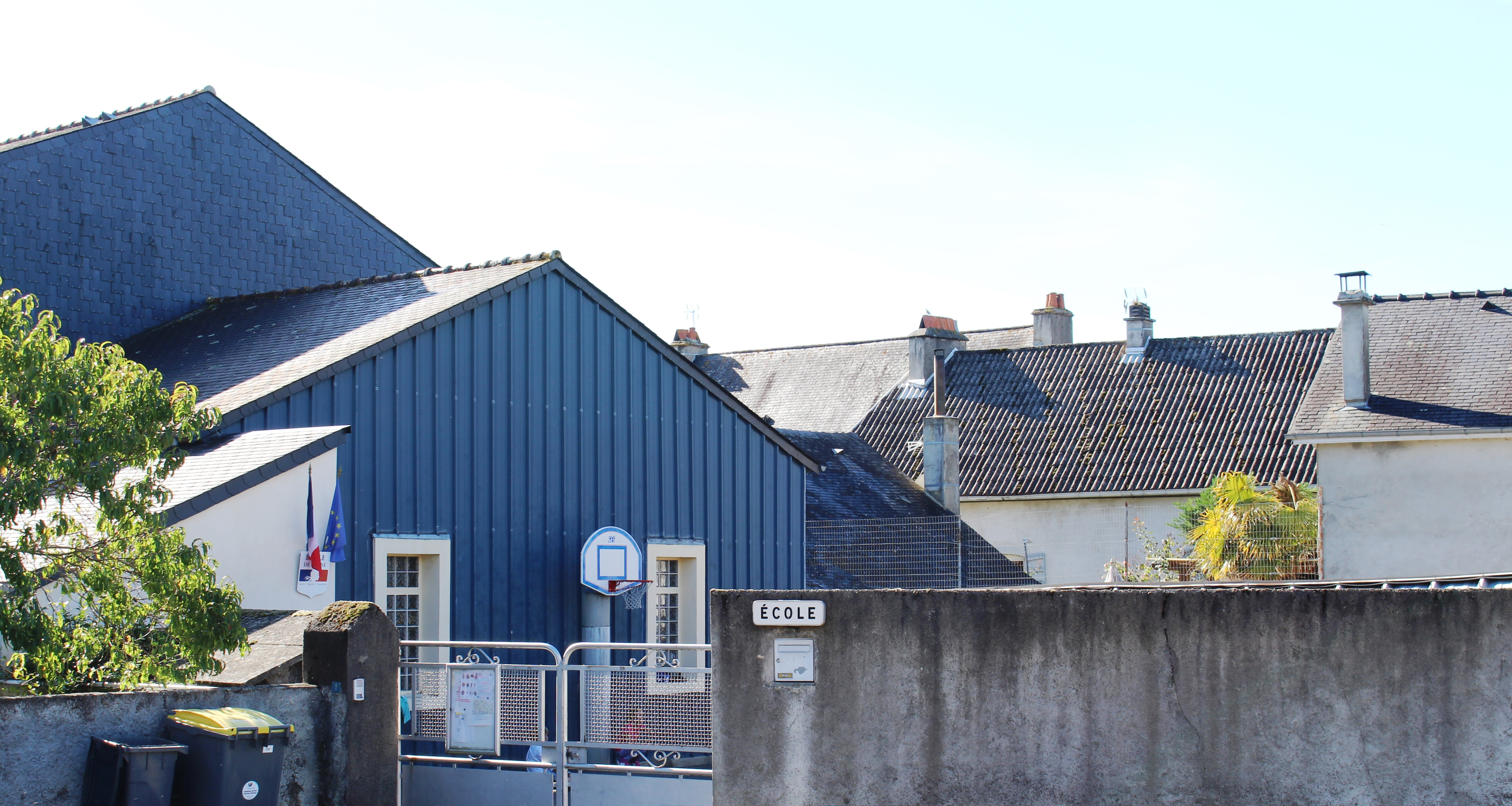 École de Lanne (Hautes-Pyrénées)